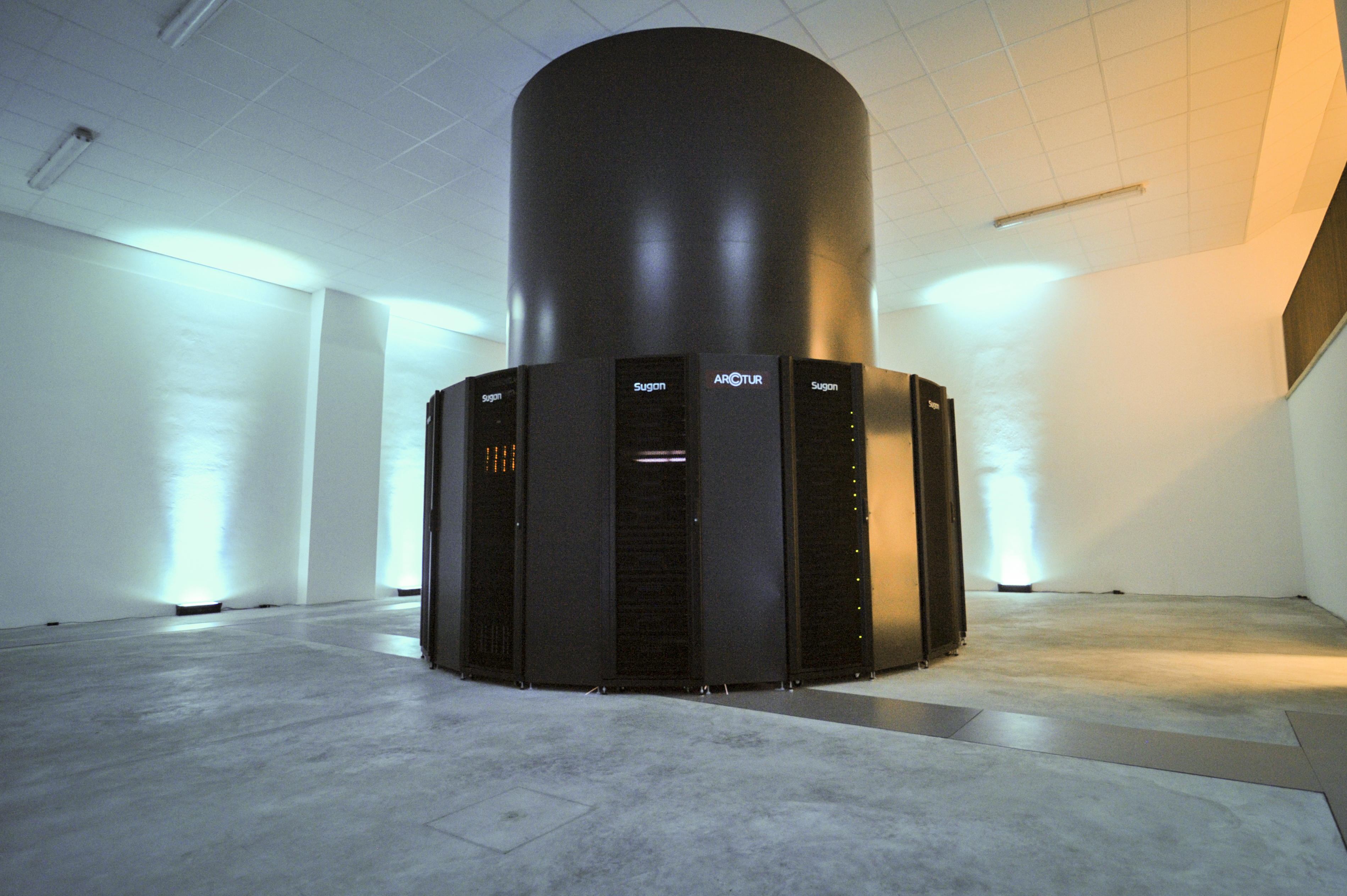 Foto Arctur